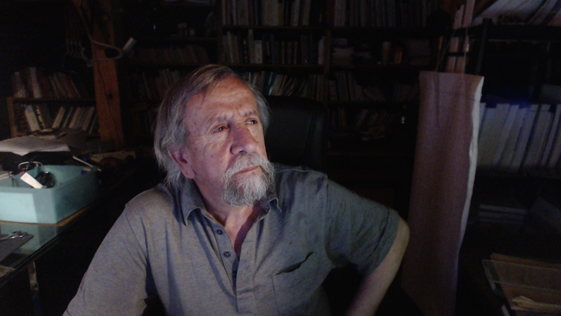 Sami Aldeeb in his library that he uses to present his works.